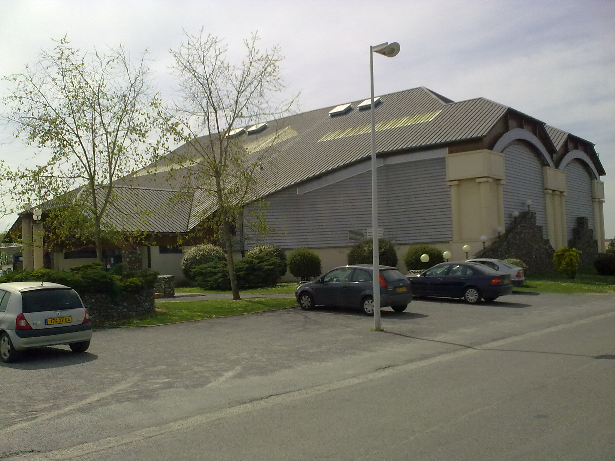 Uzein France Europe